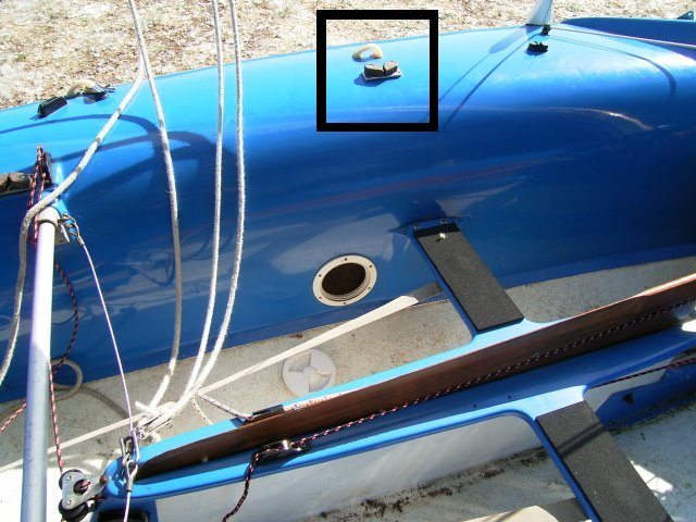 Sittbrunnen och flyt-tanken i en 420-jolle med skotråttan utmärkt. Originalbild: 420erTank.JPG